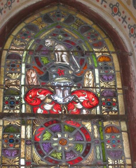 Kirche Gröben, Brandenburg. Schlabrendorfer Fenster.